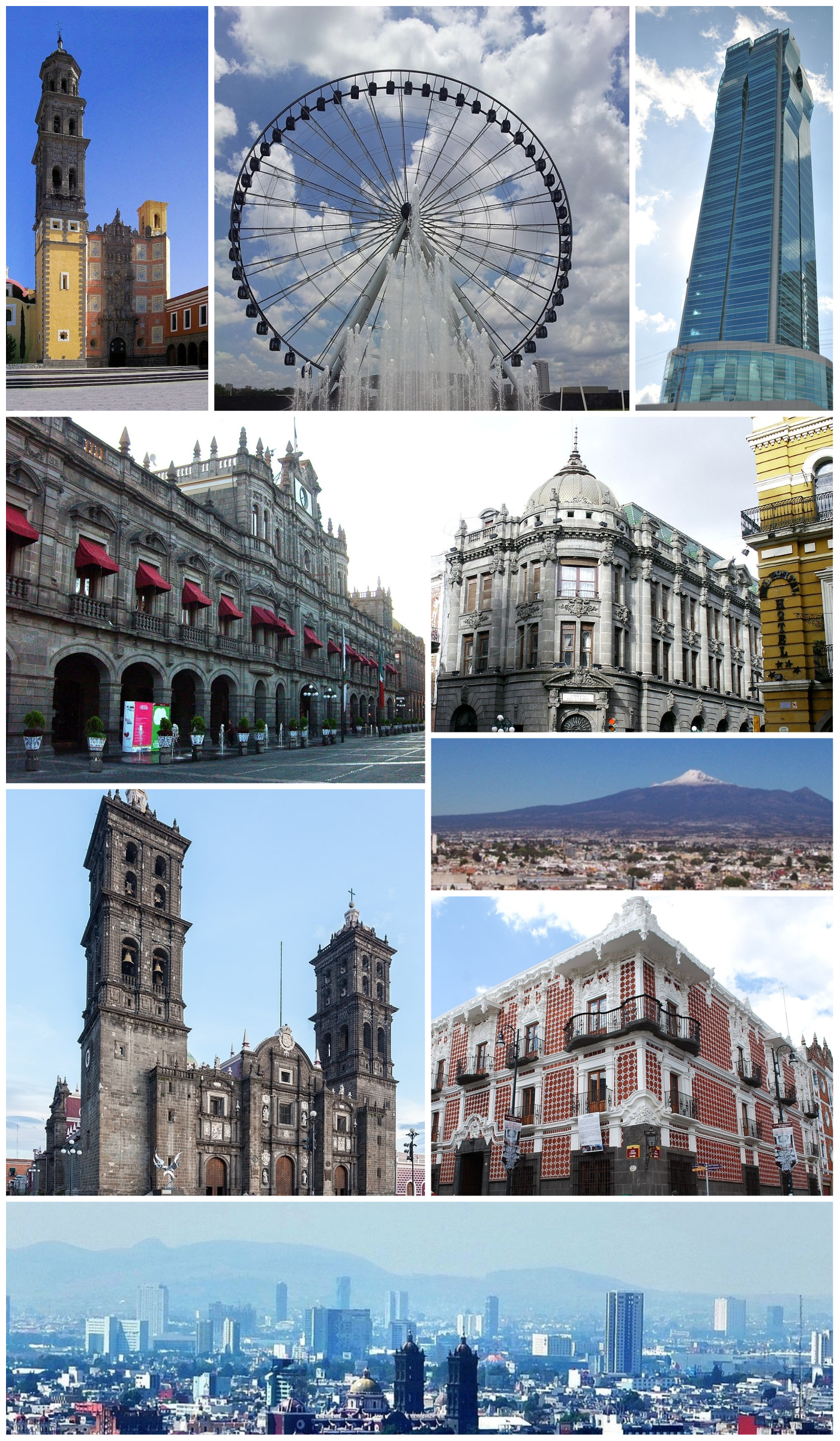 Puebla